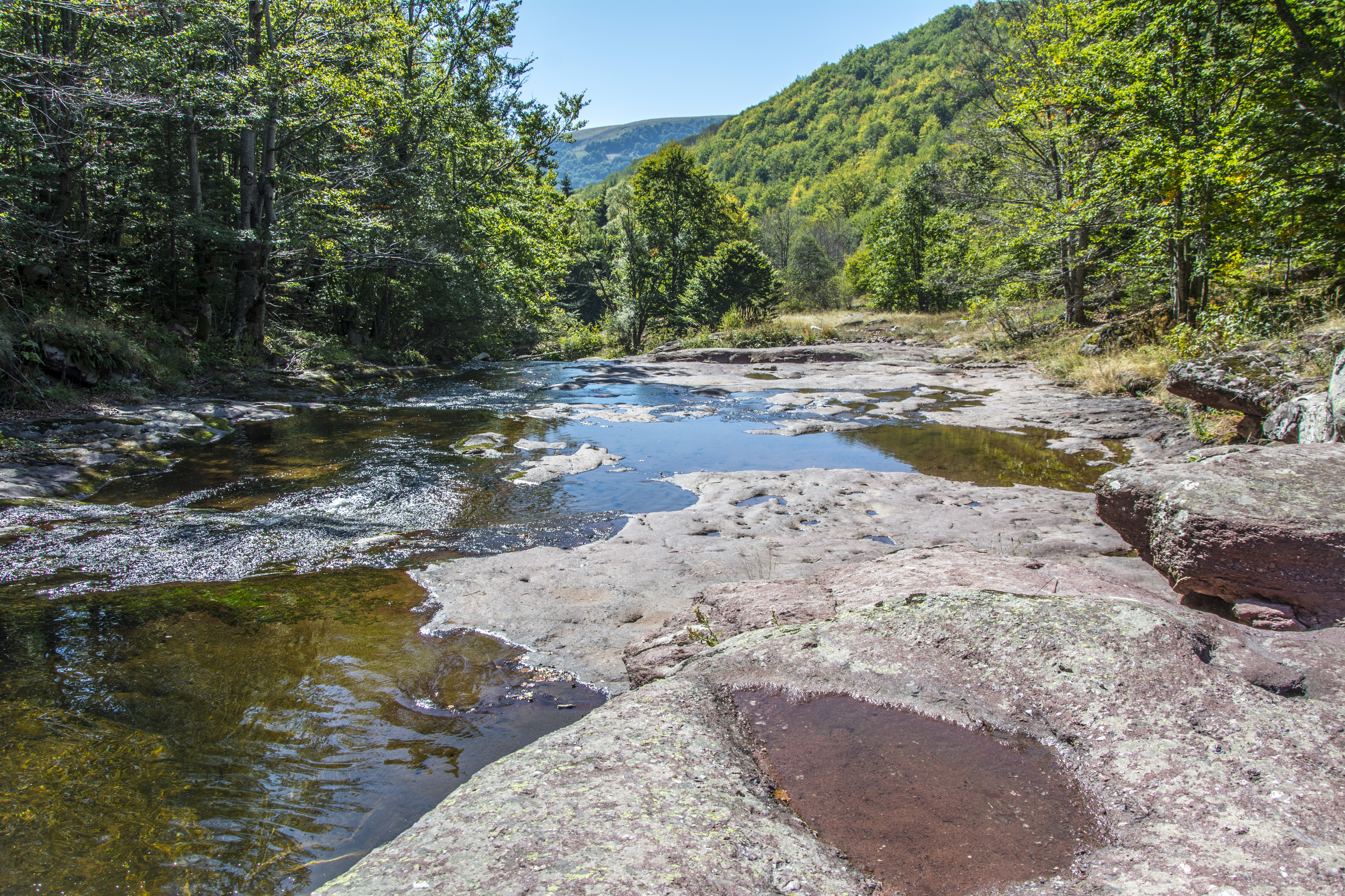 Речна долина Арбиње